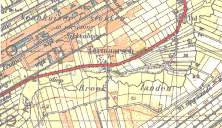 Ter Maarsch in 1930. Fragment uit van topografische kaart uit plusminus 1930. Rechtenvrij door ouderdom